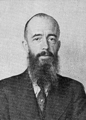 Johannes Antonius Alphonsus Mekel